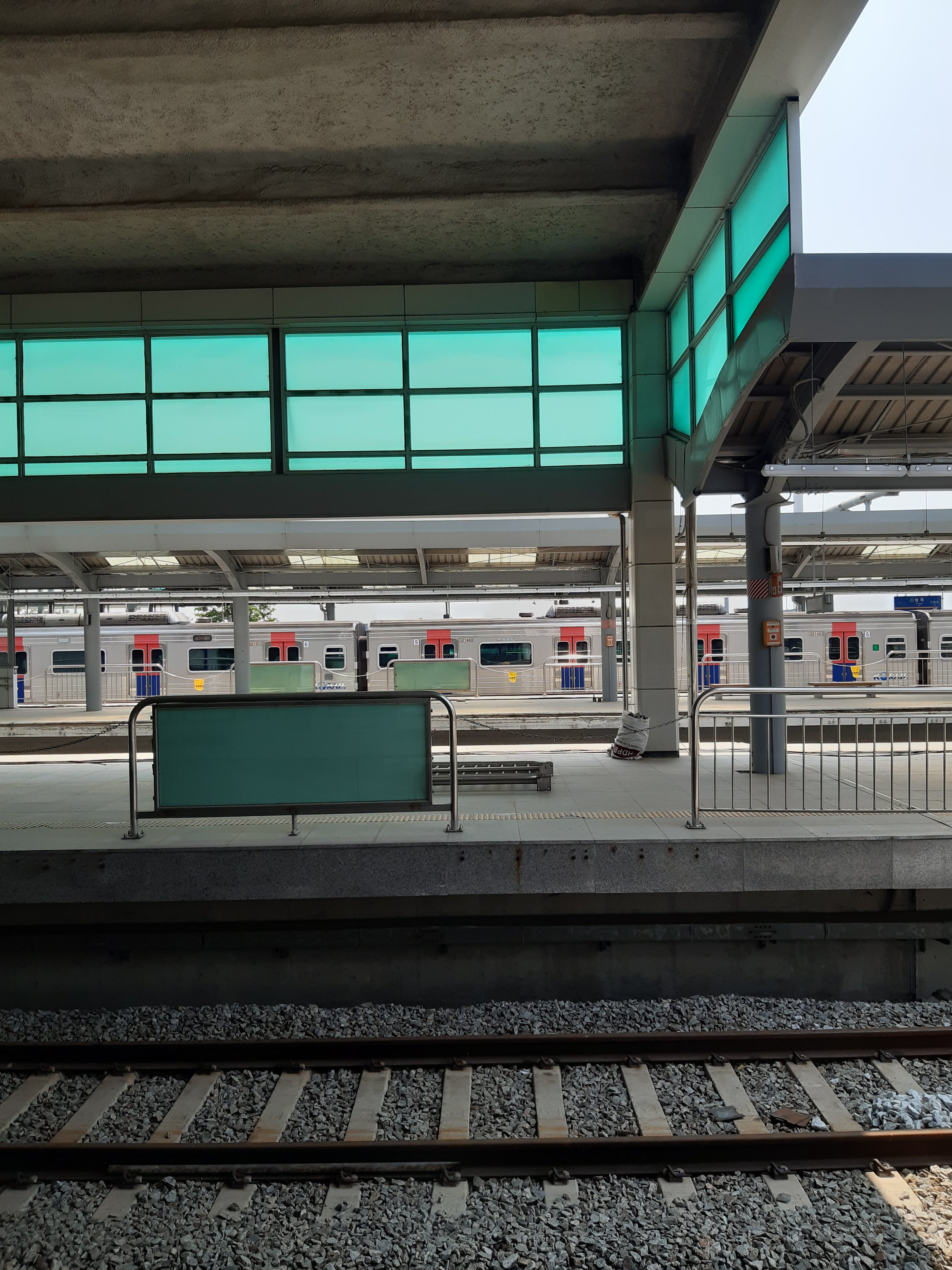 능곡역 공사중인 서해선 승강장